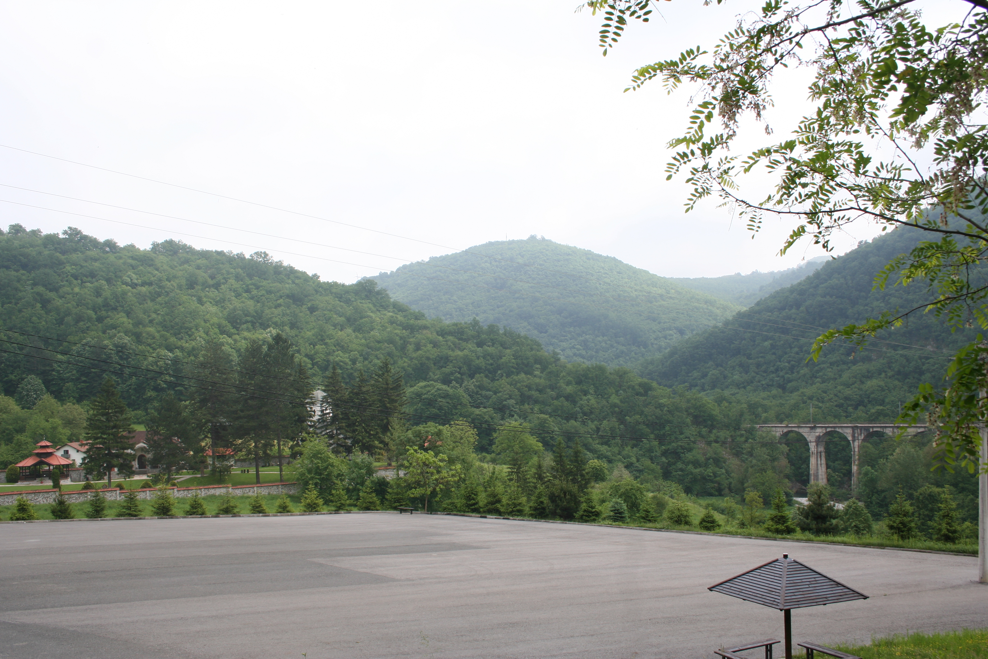 Manastir Ćelije